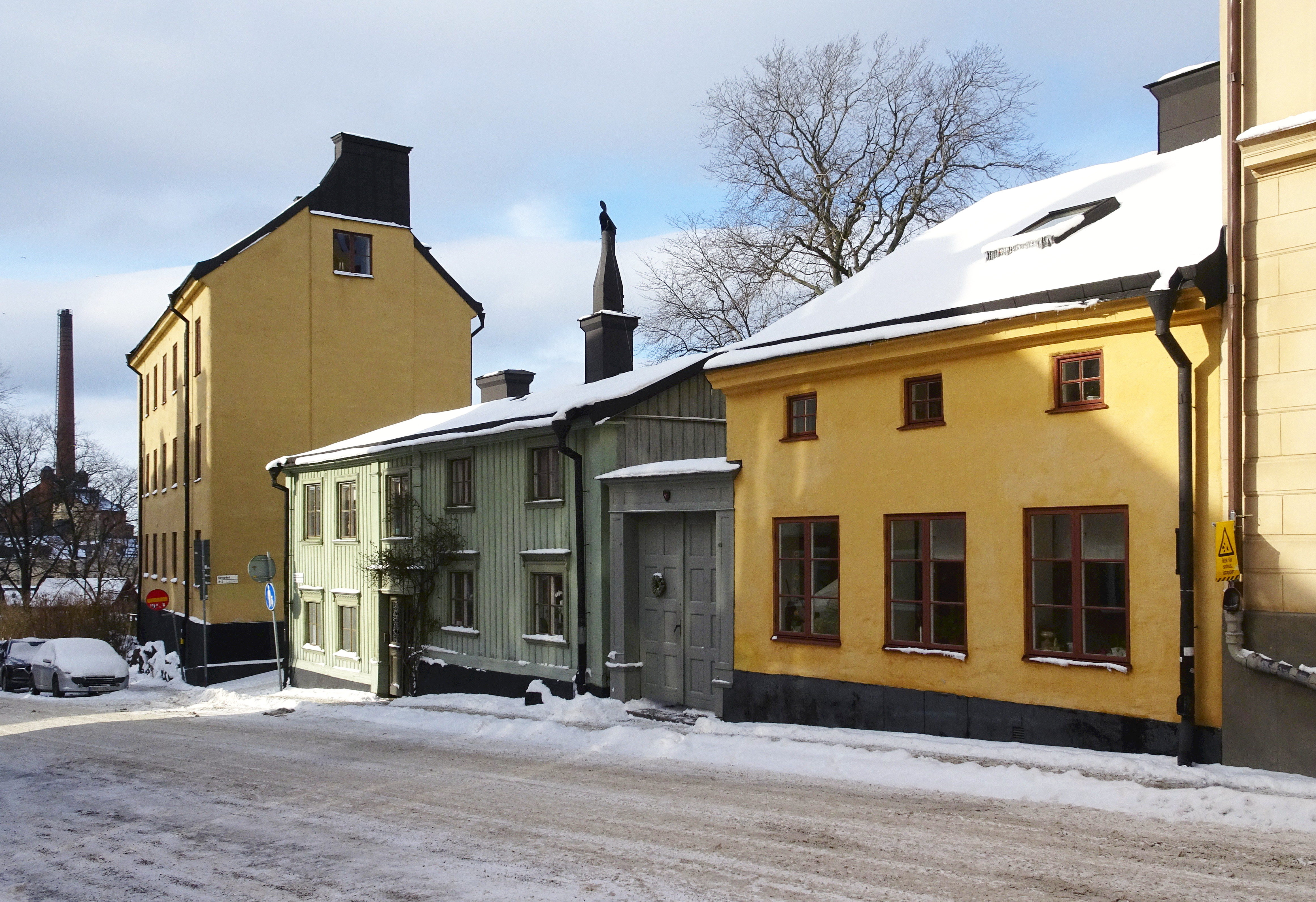 Bastugatan 44, 46, 48 (fr. höger t. vänster)